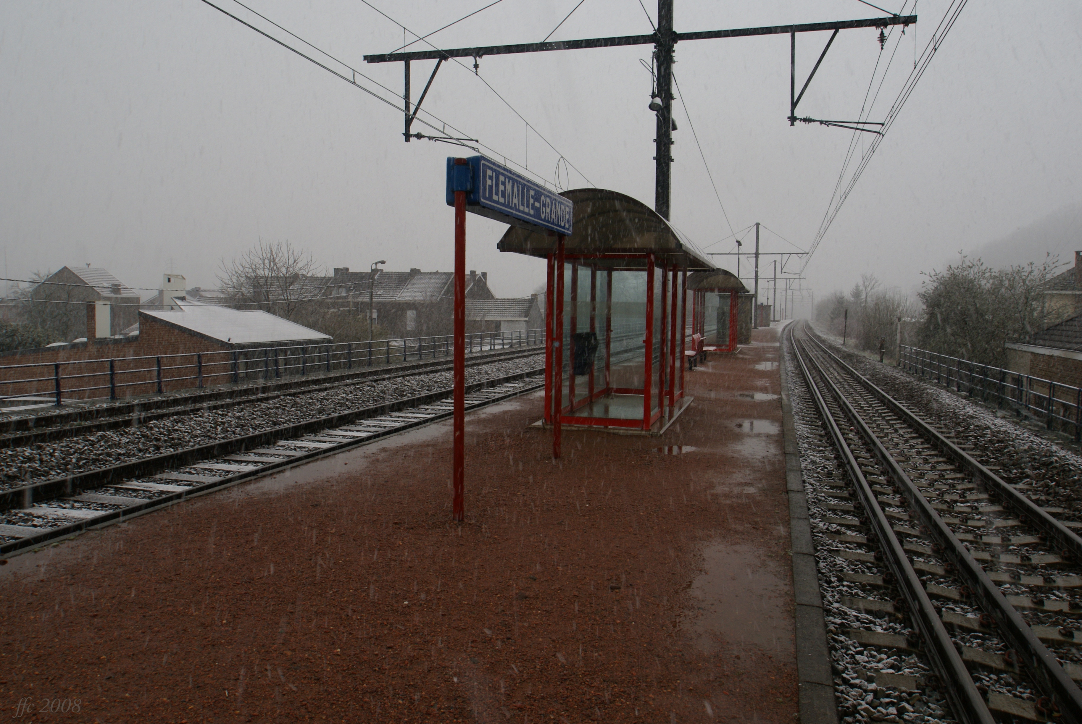 Flémalle-Grande (Belgium) Platform of the railway station Andana de l'estació ferroviària de la NMBS Quai de la gare SNCB Perron NMBS-spoorwegstation